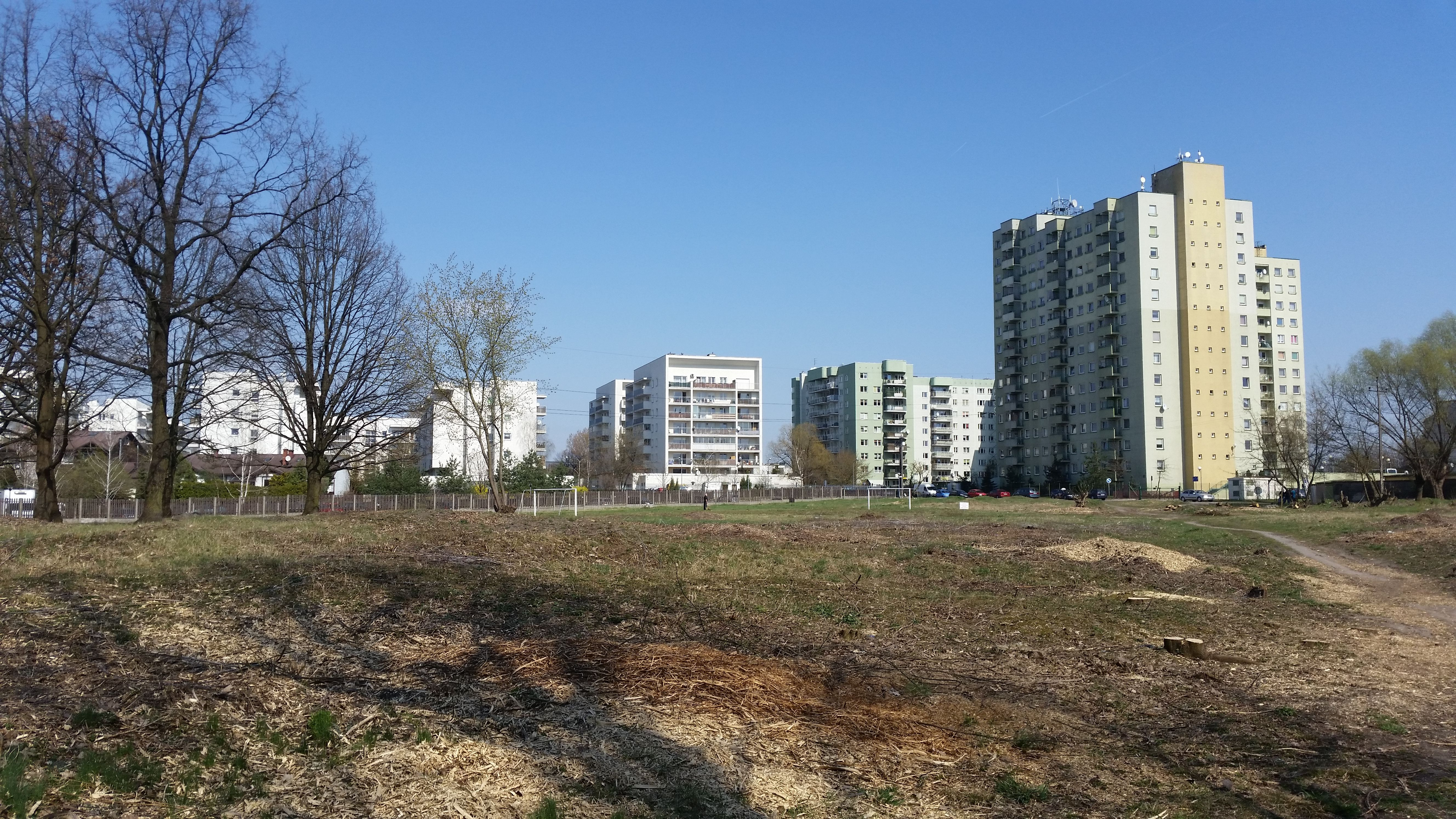 Bloki w Markach (okolice ulicy Małachowskiego)